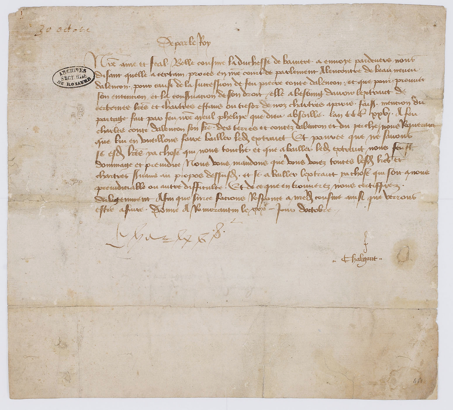 Lettre de Charles VII ordonnant au garde du Trésor des chartes de rechercher les pièces relatives à la succession de Pierre II comte d'Alençon